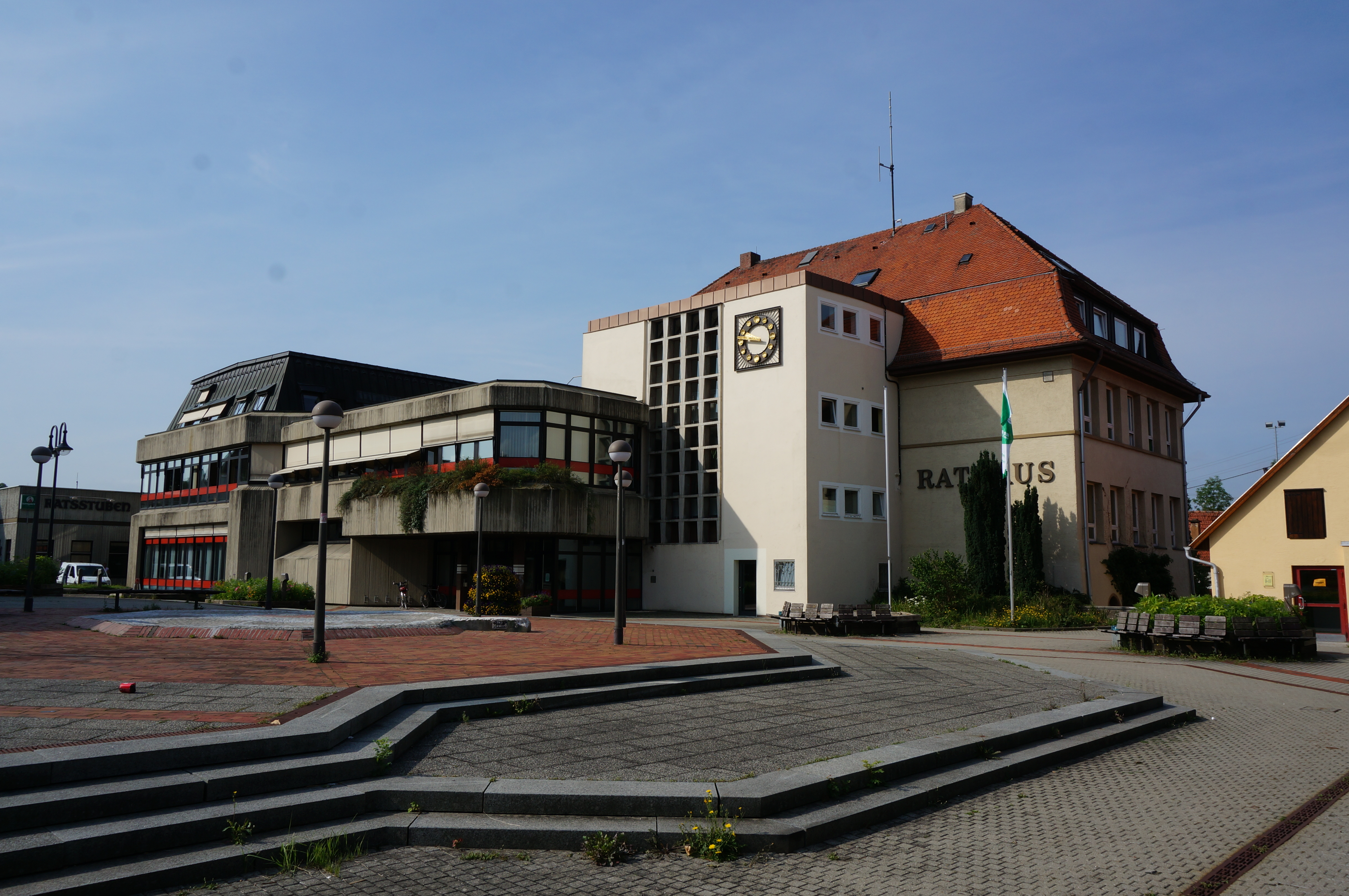 à Herbrechtingen.